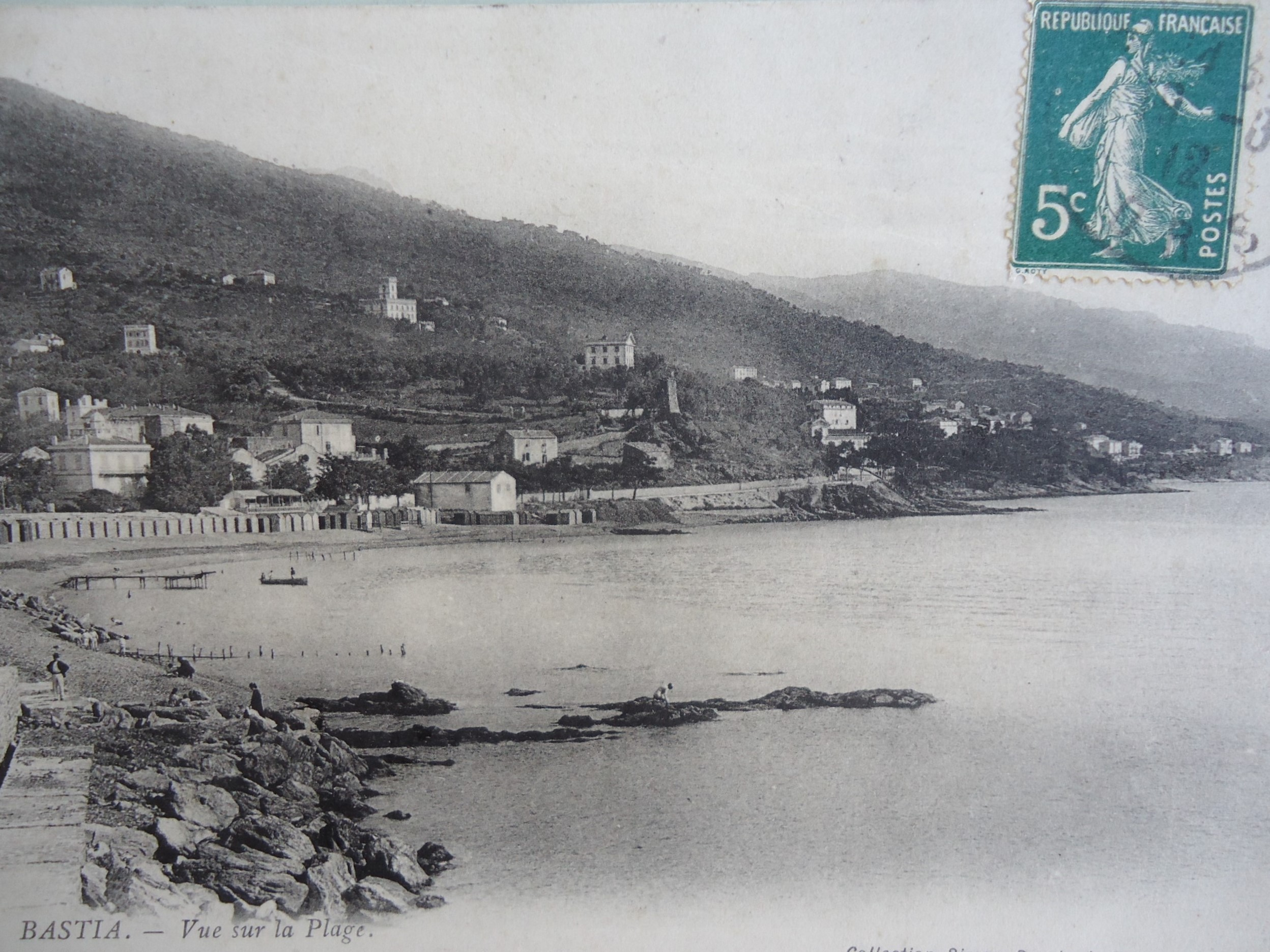 Bastia (Corsica), l'immagine della costa, con la spiaggia di Toga, in una cartolina inizio secolo XX.